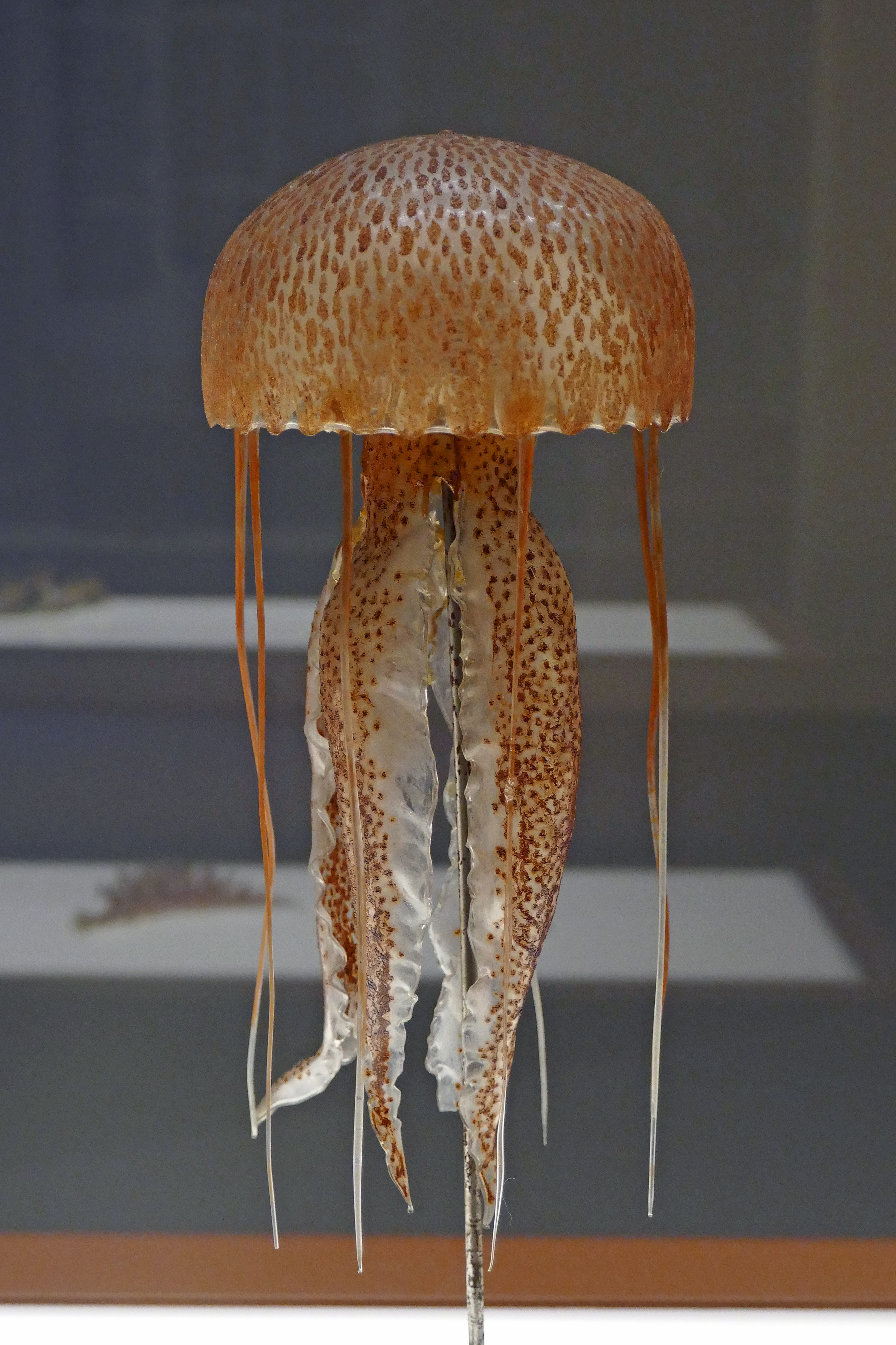 Leopold et Rudolf Blaschka. Pelagia noctiluca. Modèle en verre. Collection du Musée zoologique de Strasbourg. Exposition Laboratoire d'Europe Strasbourg, 1880-1930 au Musée d'art moderne et contemporain de Strasbourg.